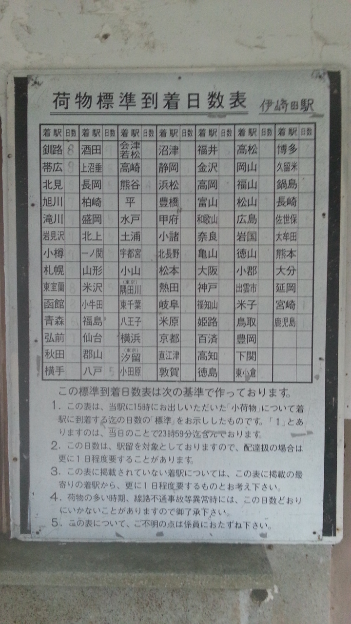 伊崎田駅舎内 荷物標準到着日数 掲示板 （2012年12月28日撮影）